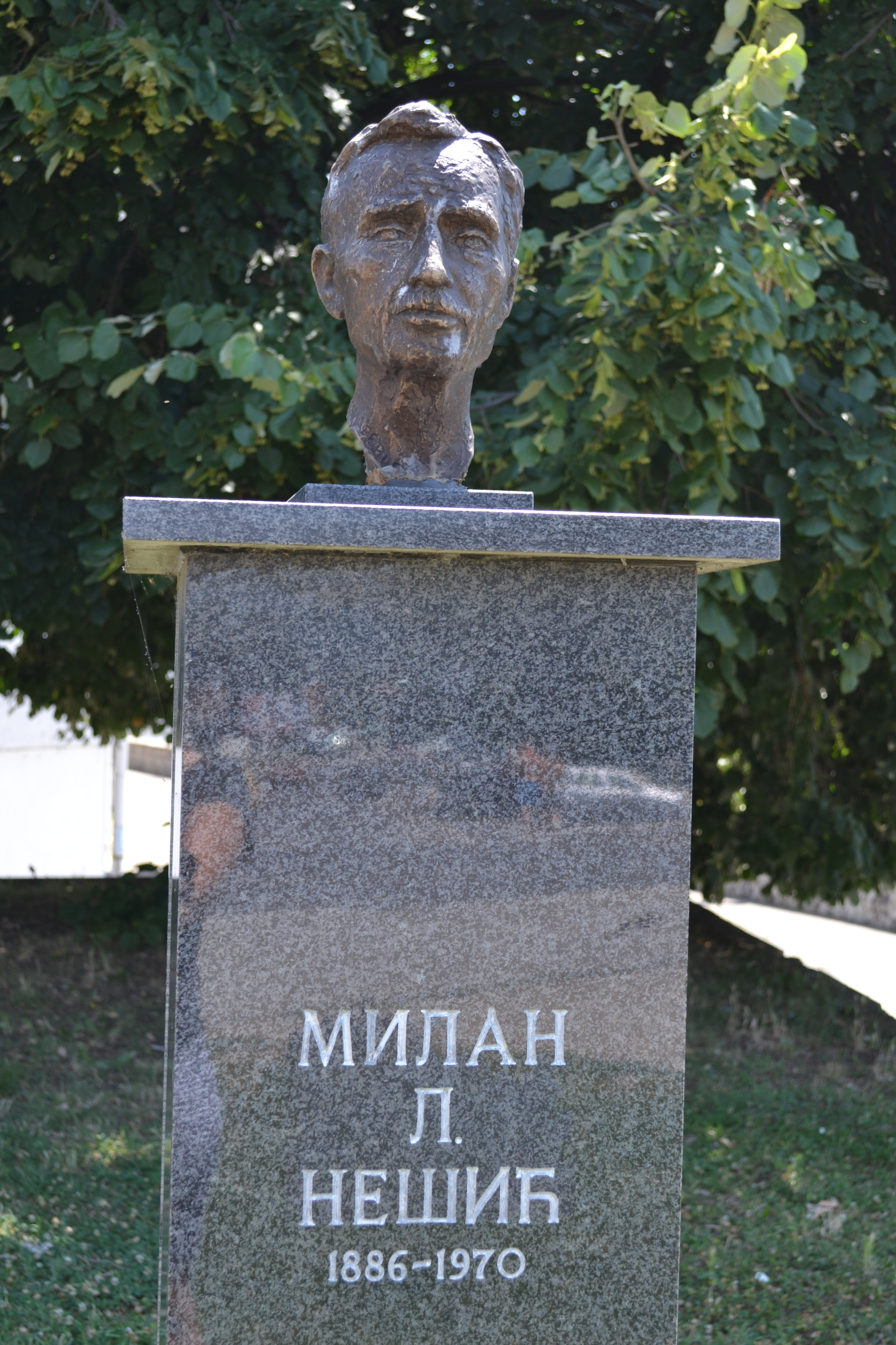 Биста Милана Нешића у Власотинцу